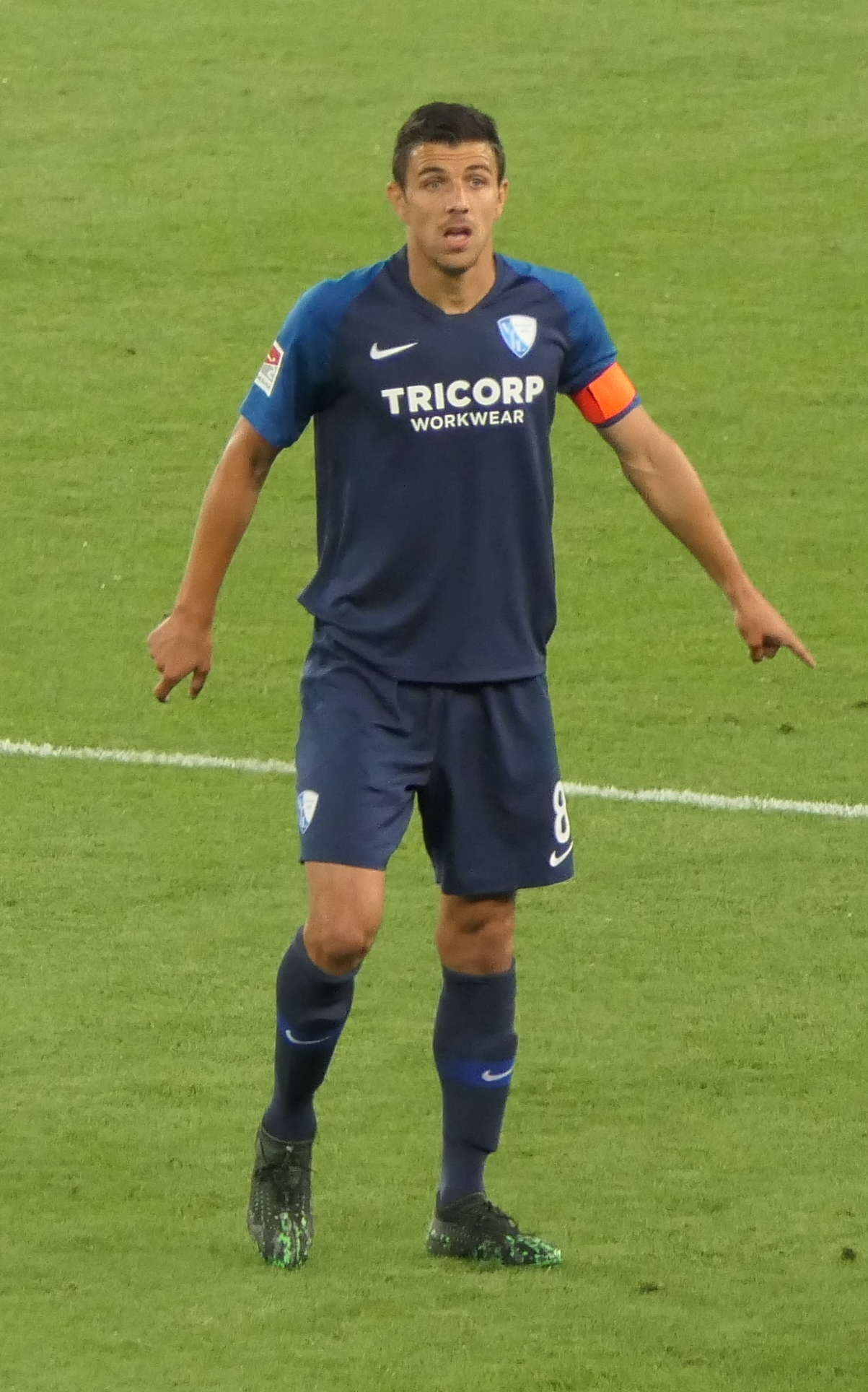 Der Fussballprofi Anthony Losilla im Trikot vom VfL Bochum beim Auswärtsspiel gegen den VfB Stuttgart am 02.09.2019.